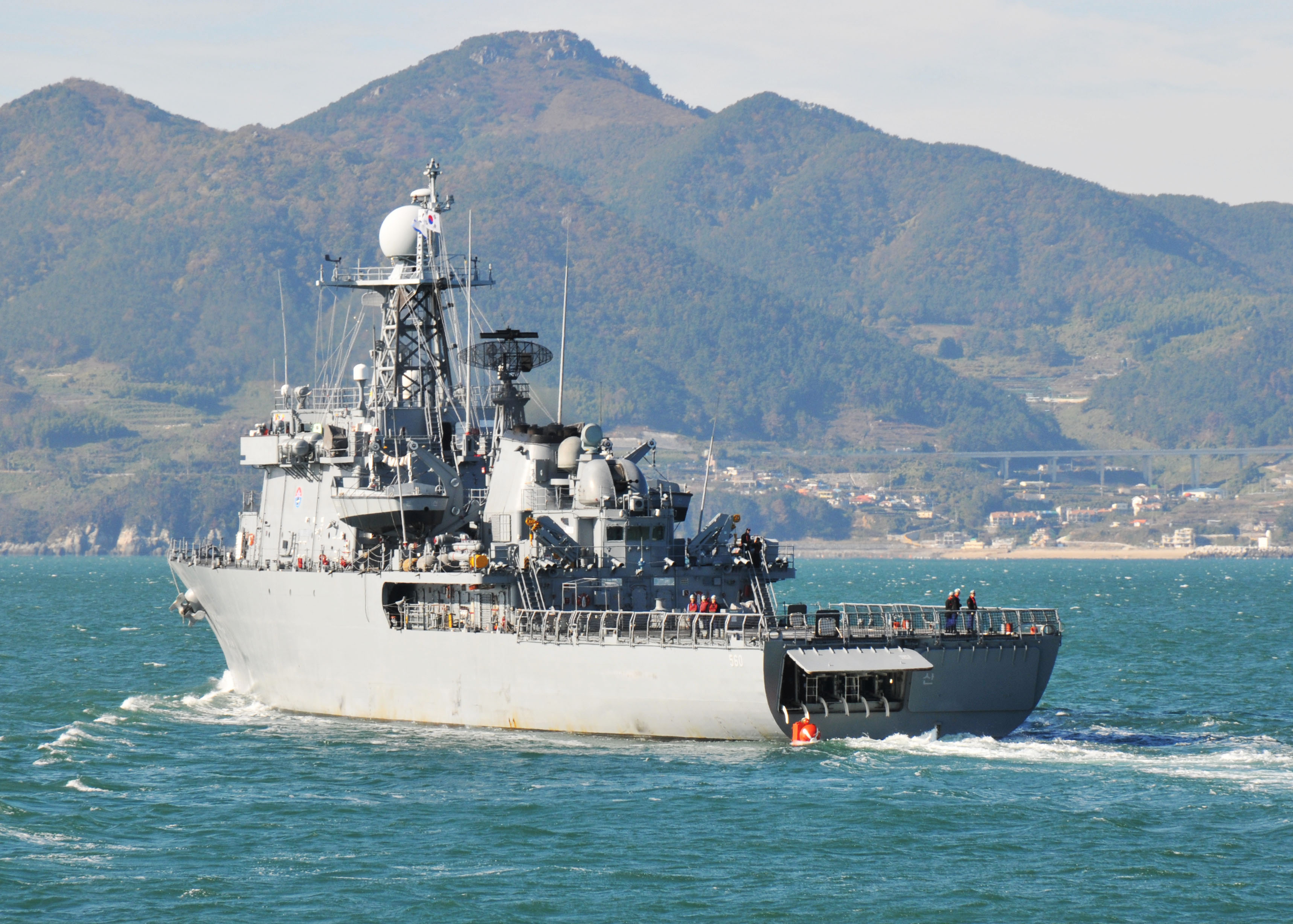 한미 해군은 지난 12일부터 경남 거제도 인근 해상에서 연합 기뢰전 훈련을 실시하였다. 본훈련을 통해 임무수행 능력을 높이고 혈맹관계를 공고히 다지는 성과를 거뒀다 촬영자 : 남기태